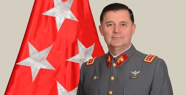 General Ricardo Martinez Menanteau.